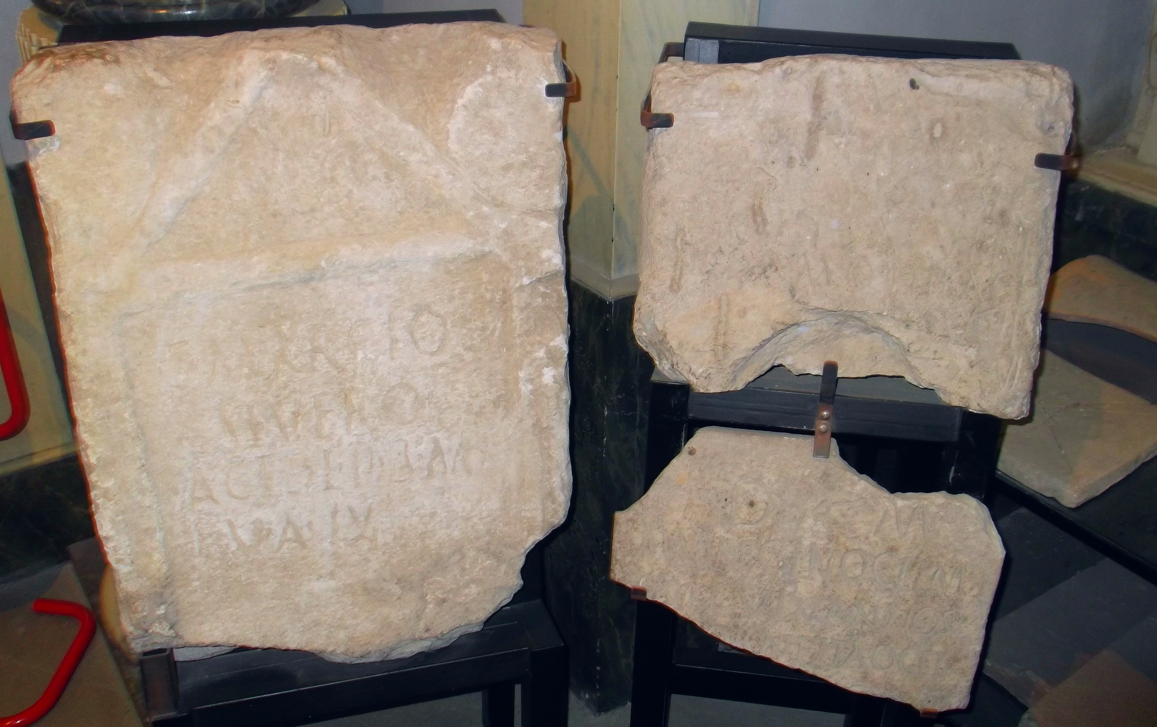 Inscripciones romanas procedentes de Ruvo di Puglia (Italia), correspondiente la primera con CIL IX 314: C(aio) Marcio / Severo / Acte l(iberta) p(atrono) b(ene) m(erenti) f(ecit) / v(ixit) a(nnos) LV